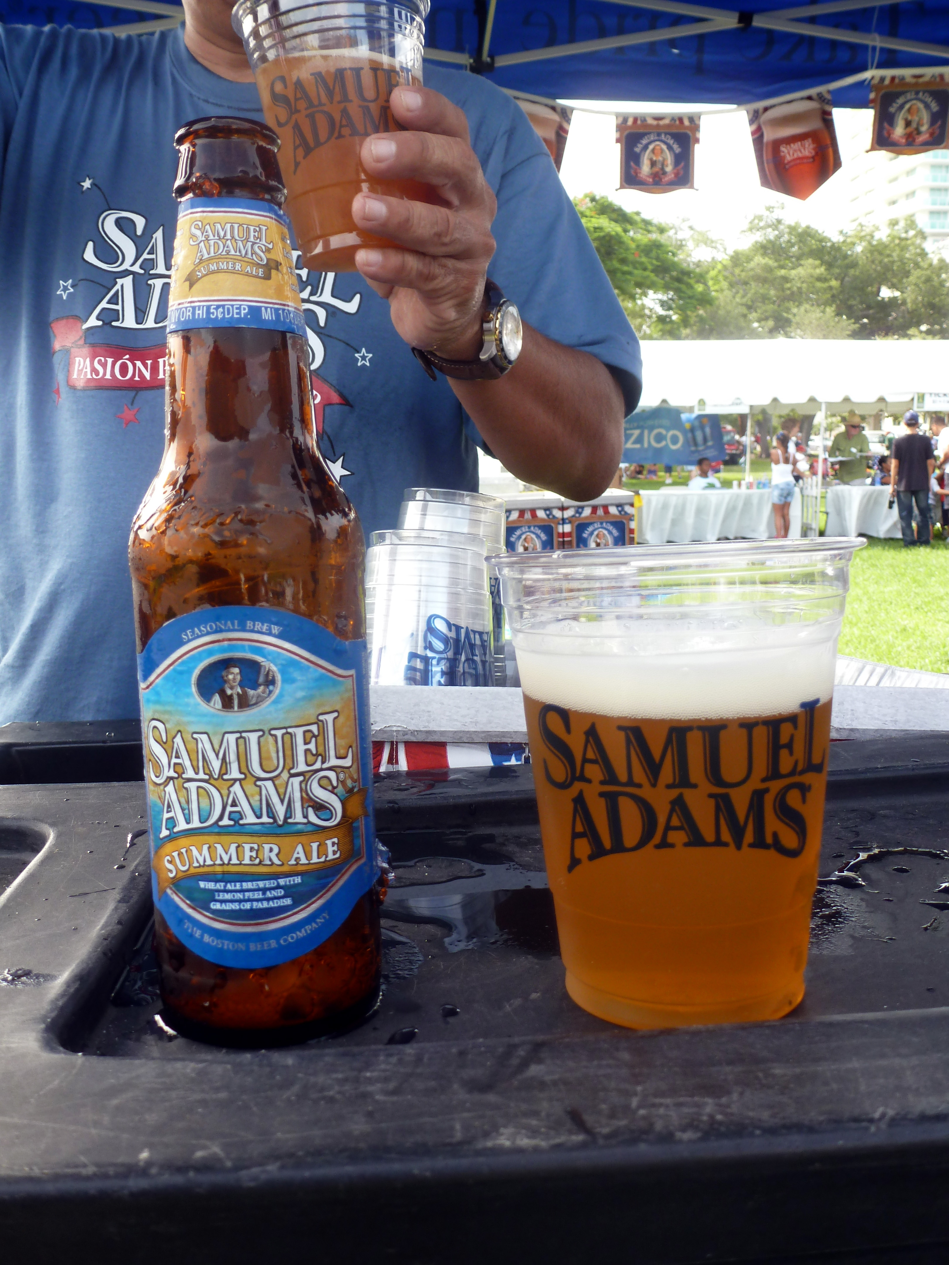 Samuel Adams Summer Ale